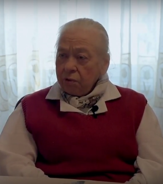 Nadejda Brânzan